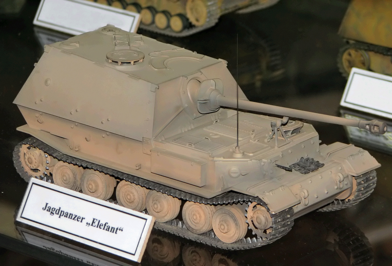 Dieses Bild zeigt ein Modell des Panzerjägers "Elefant".